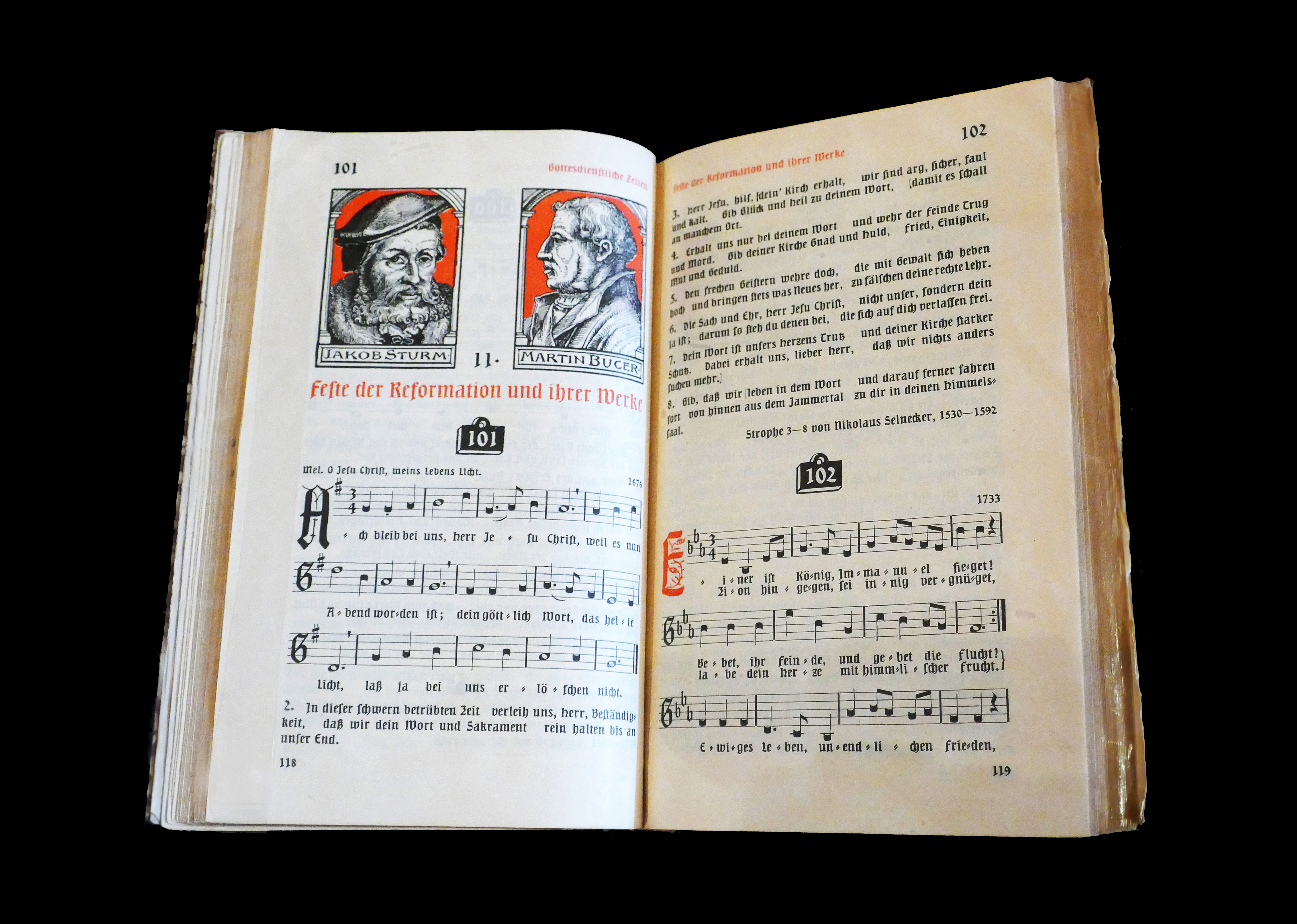 Friedrich Spitta (1852-1924), Evangelisches Gesangbuch für Elsass-Lothringen, 1899 (Strassburg, Heitz & Mündel, 1907).